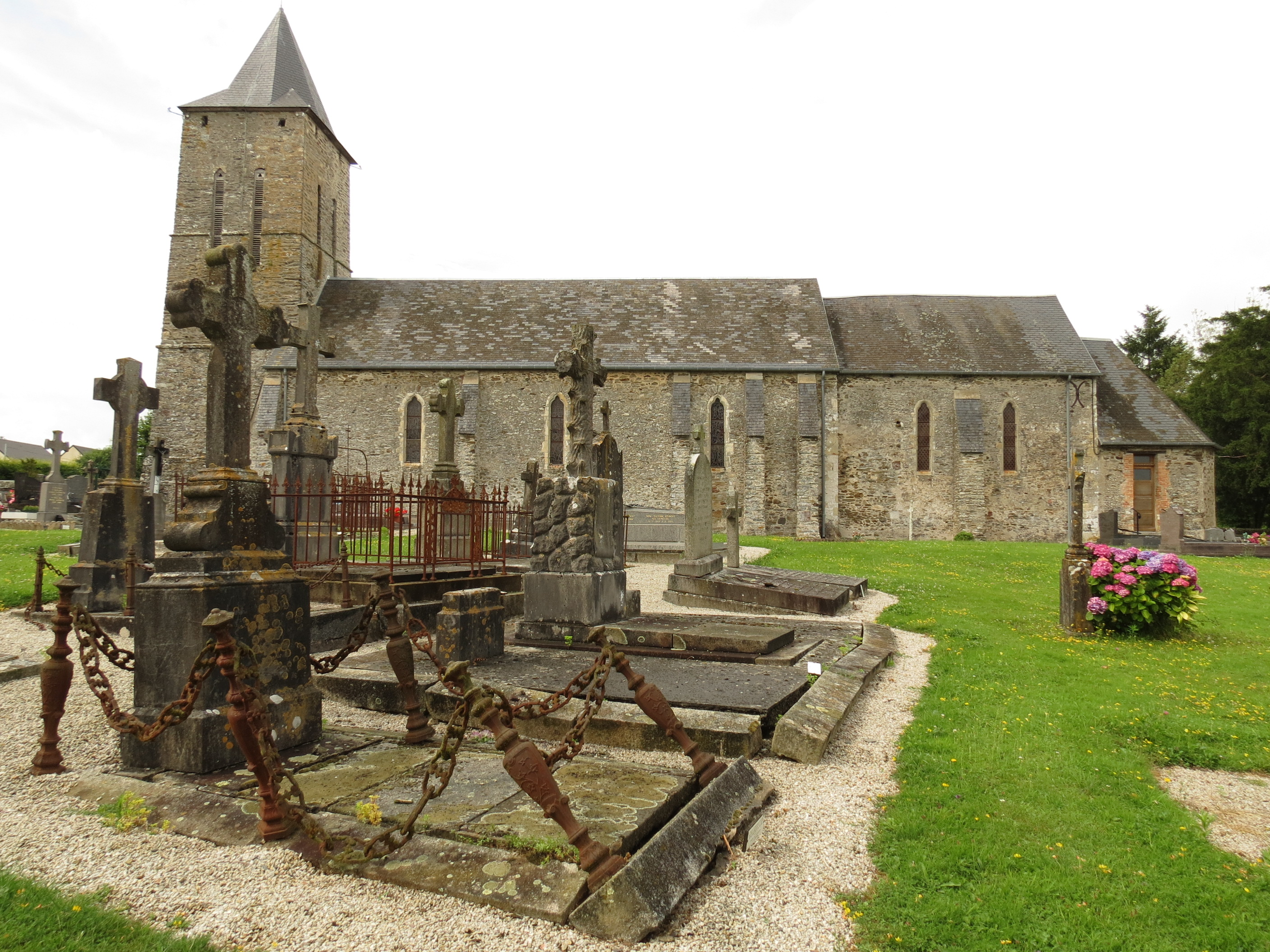 Eglise de Le Mesnil-Rouxelin, bel ensemble de tombes anciennes.